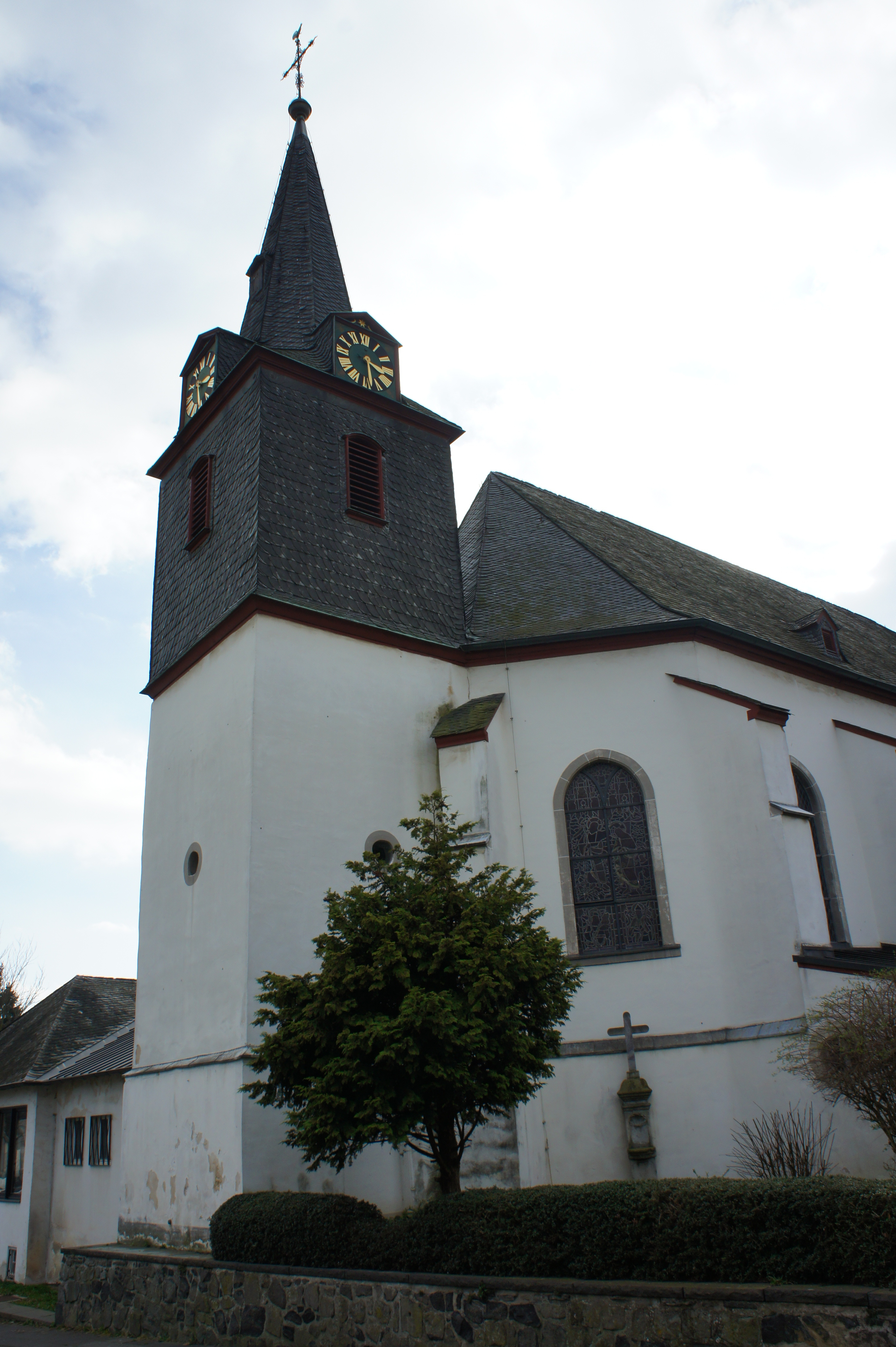 Katholische Pfarrkirche St. Margareta, Töpferstraße, Wachtberg-Adendorf